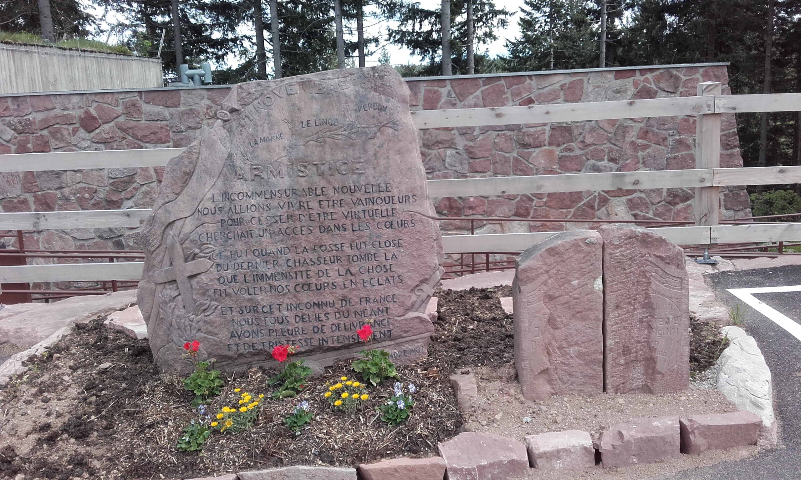 Haut-Rhin, Orbey, Pierre armistice devant le Musée-Mémorial du Linge, lieu de mémoire de la Grande Guerre.